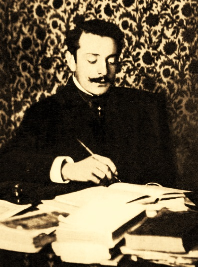 Ovid Aron Densusianu (numele de familie pronunțat Densușianu; n. 29 decembrie 1873, Făgăraș, d. 9 iunie 1938, București) a fost un filolog, lingvist, folclorist, istoric literar și poet român, membru al Academiei Române și profesor la Universitatea din București.